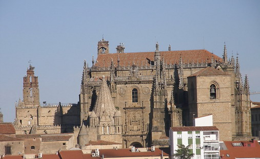 Detalle la Catedral romaníca, con su Torre del Melón, y la Catedral Plateresca.